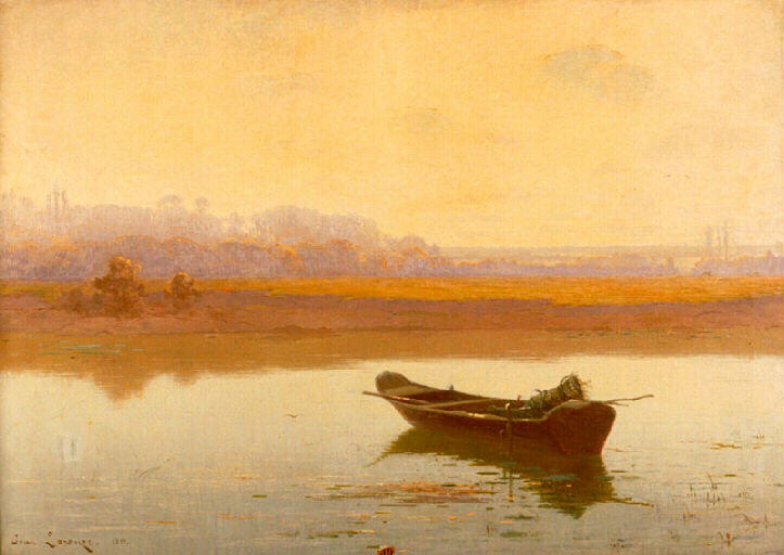 Jean_Laronze, 1852-1937, Le_Calme, 1889,131x181cm, Mâcon Musée des Ursulines.